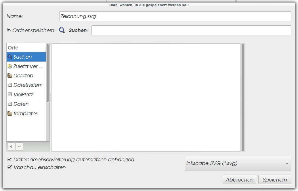 Inkscape Export Menü